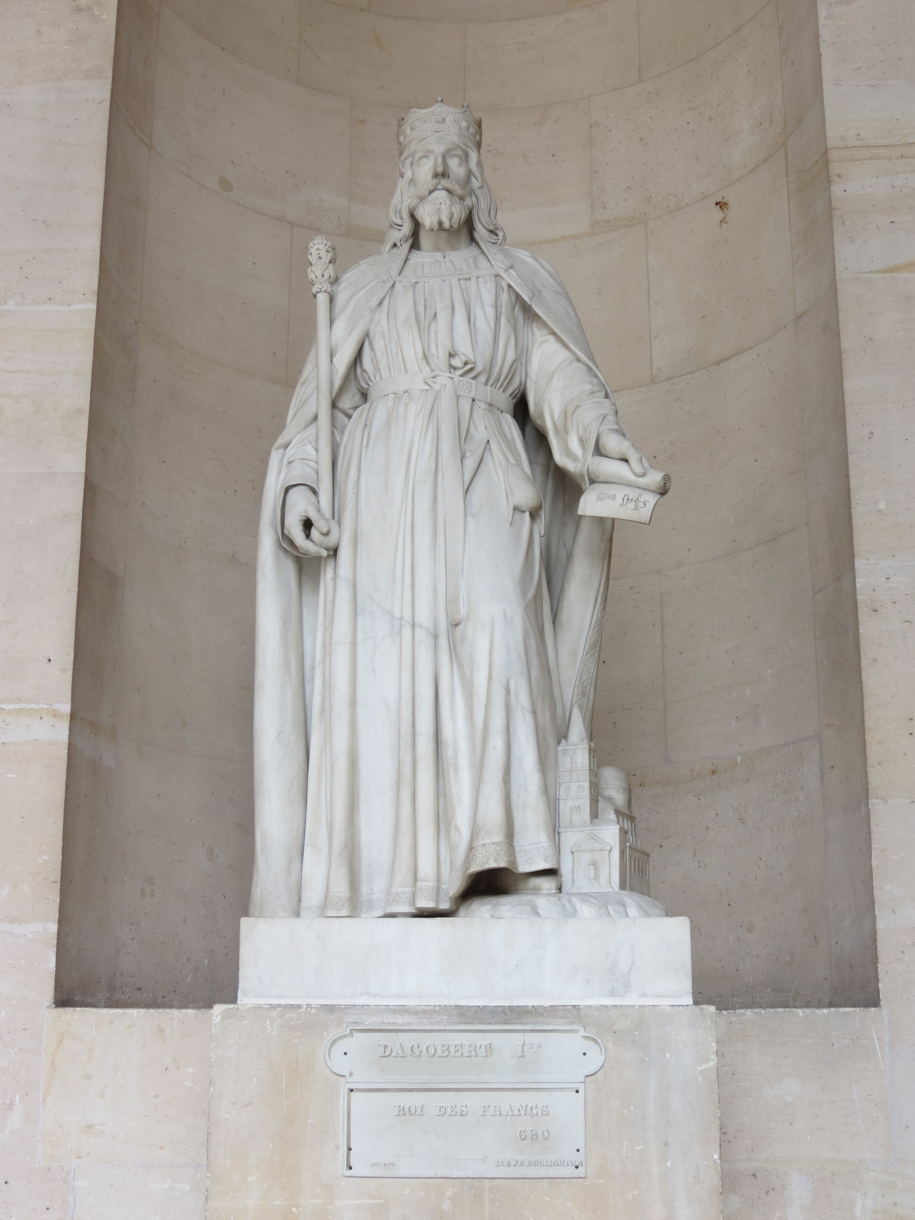 Statue de Dagobert Ier, sculptée par Jean Bernard Duseigneur.